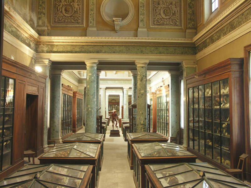 le Musée d'Anatomie de Montpellier (Hérault, France), UFR de Médecine Université Montpellier 1